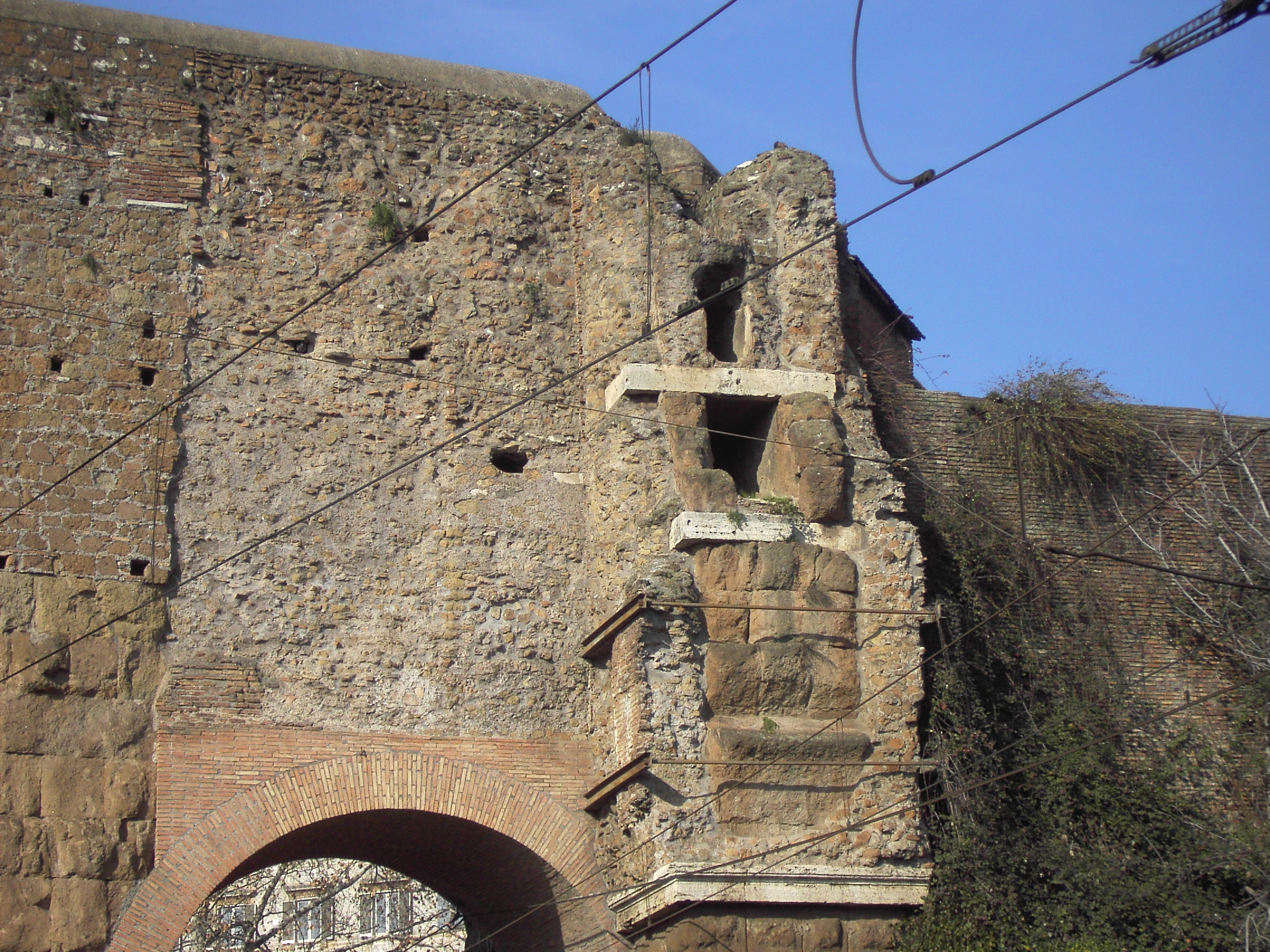 Roma, Porta Maggiore: le condotte tagliate.